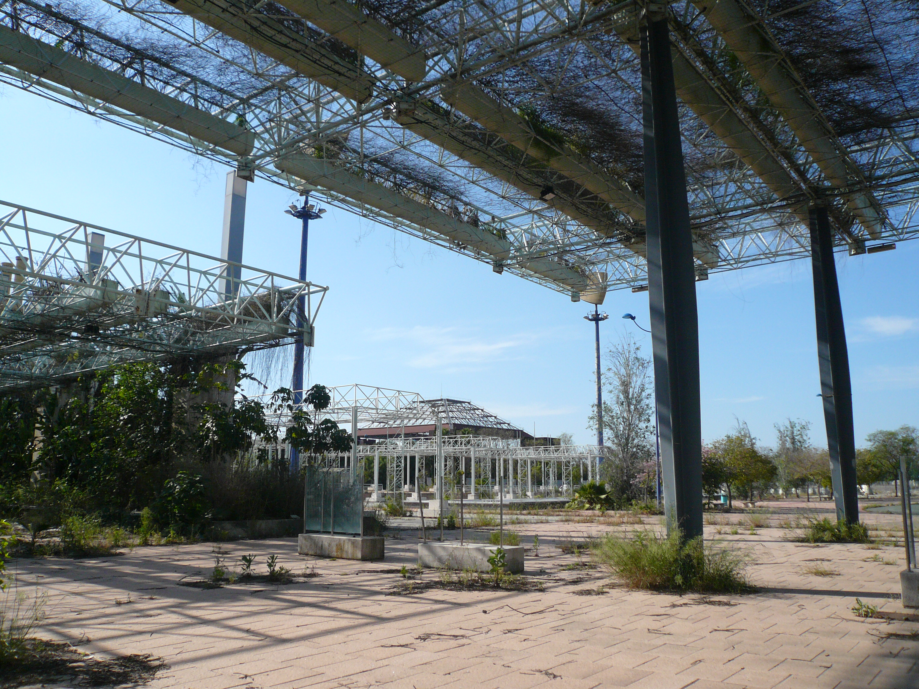 Estado de la Puerta de Triana en 2007.